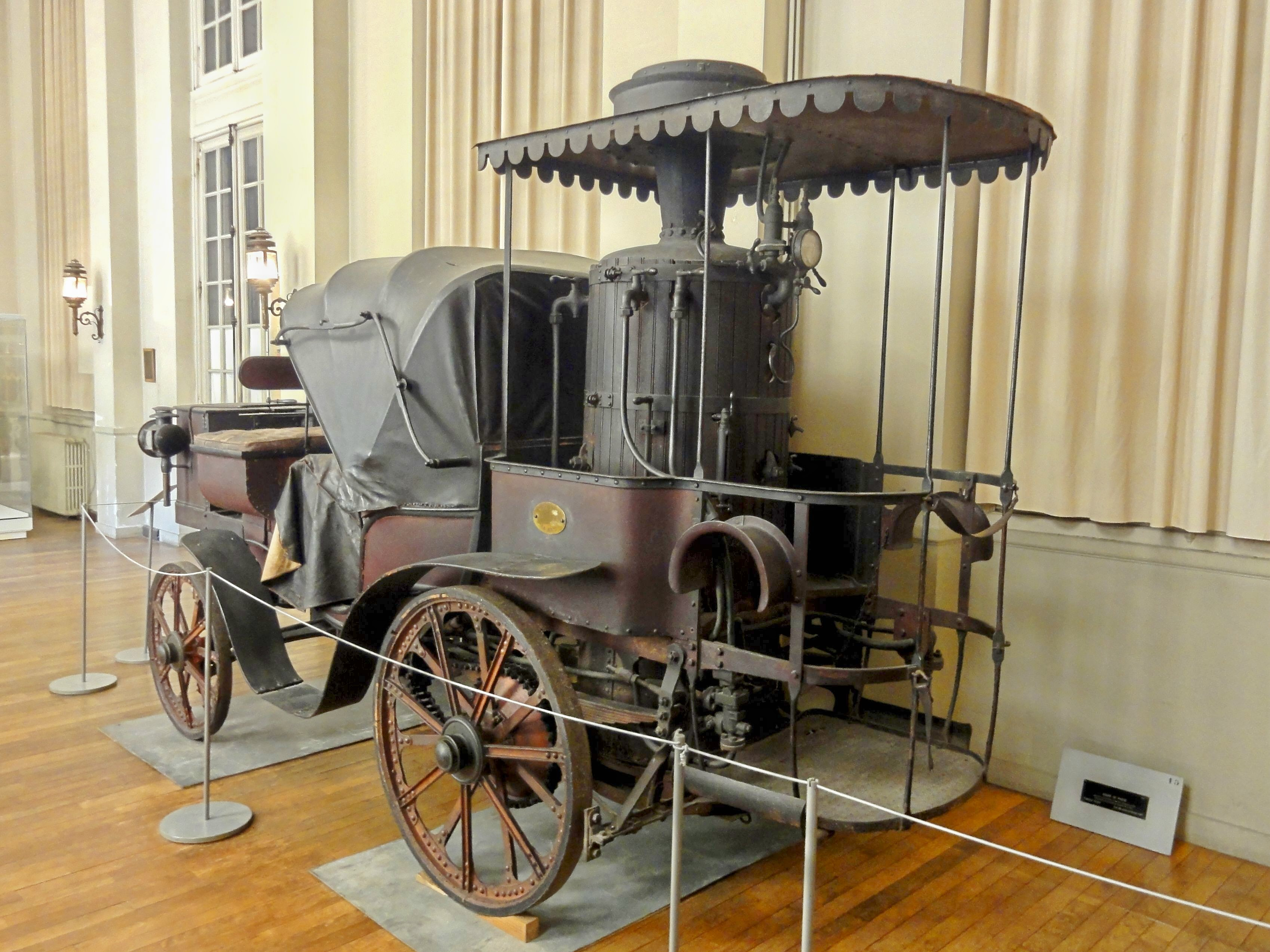 « La Mancelle » (voiture à vapeur), Amédée Bollée, Le Mans, 1878.